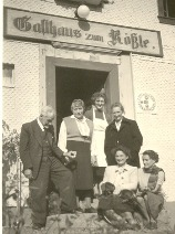 Außenaufnahme Hotel Rößle